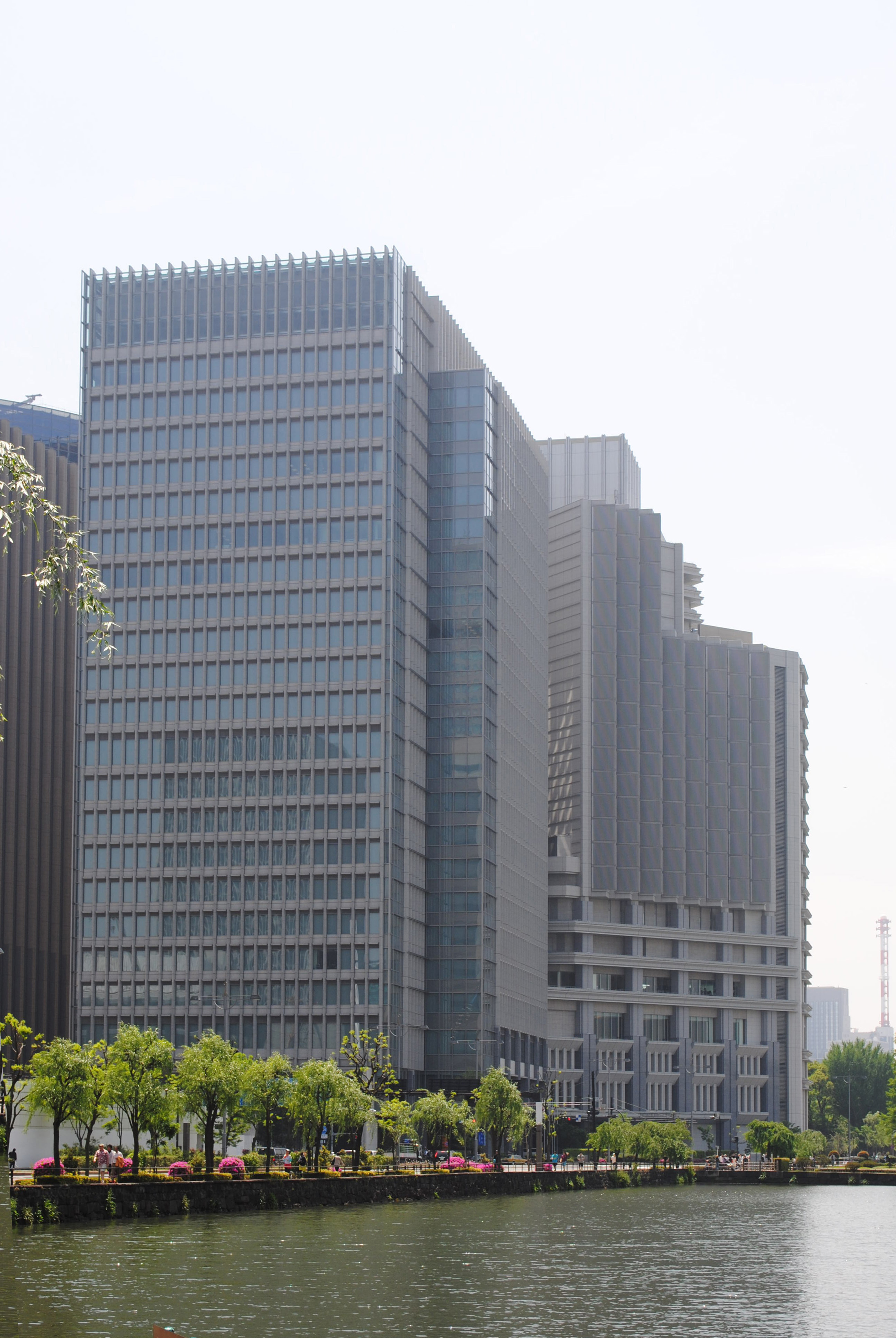 パレスビル。東京都千代田区丸の内一丁目1番1号